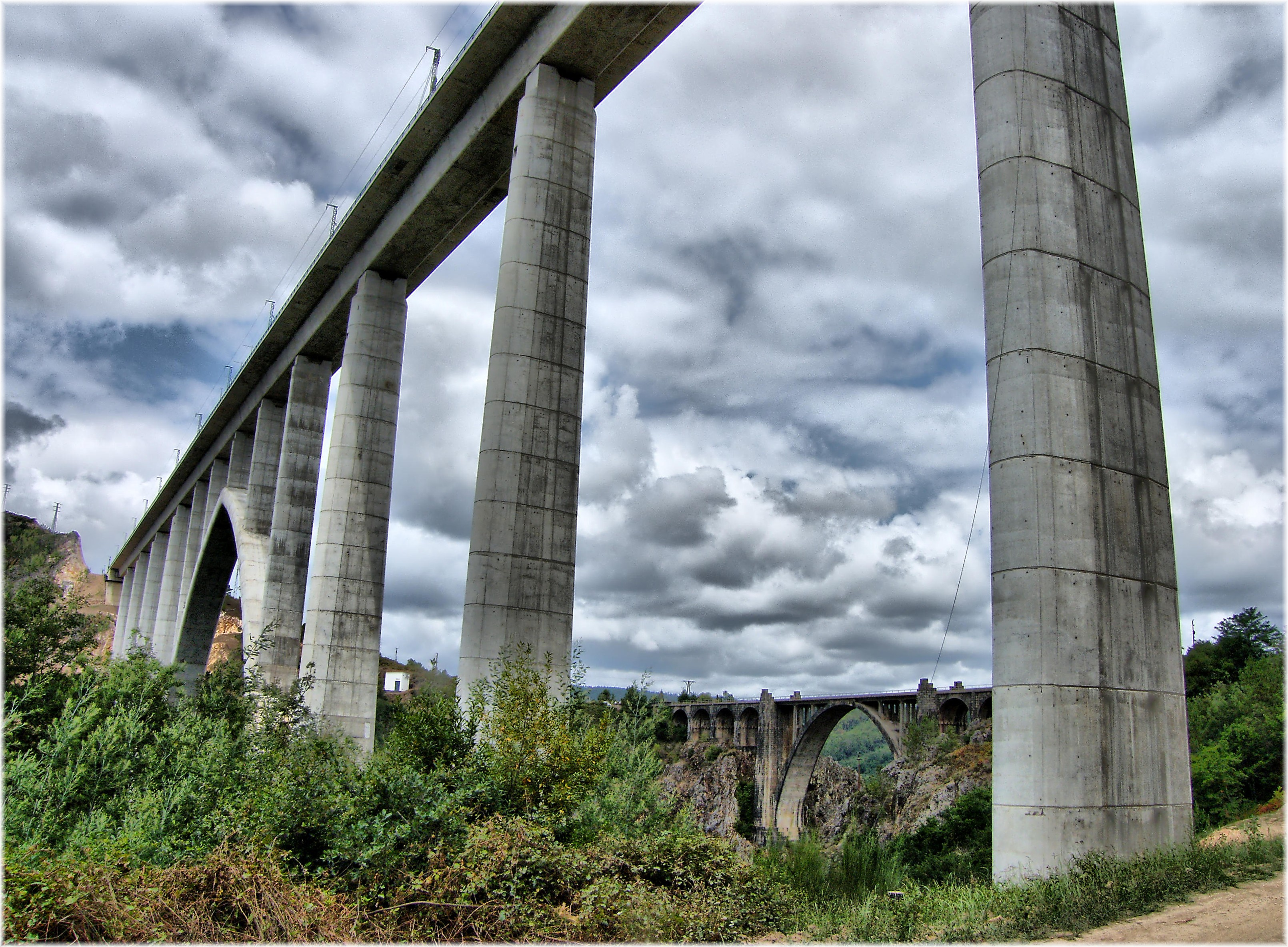 Pontes sobre o rio Ulla en Vedra (Coruña) Samsung digital camera